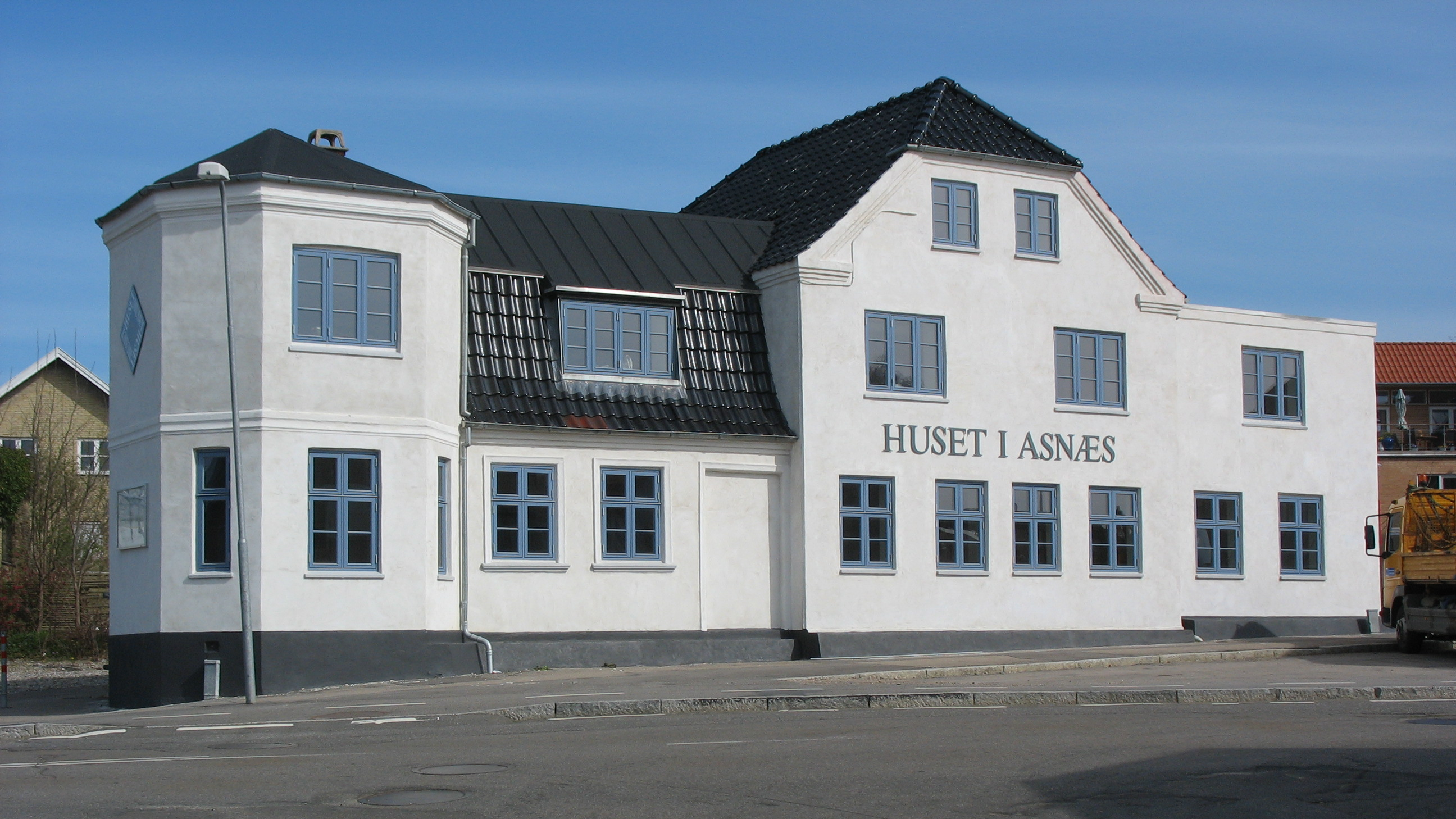 Huset i Asnæs - et kultursted